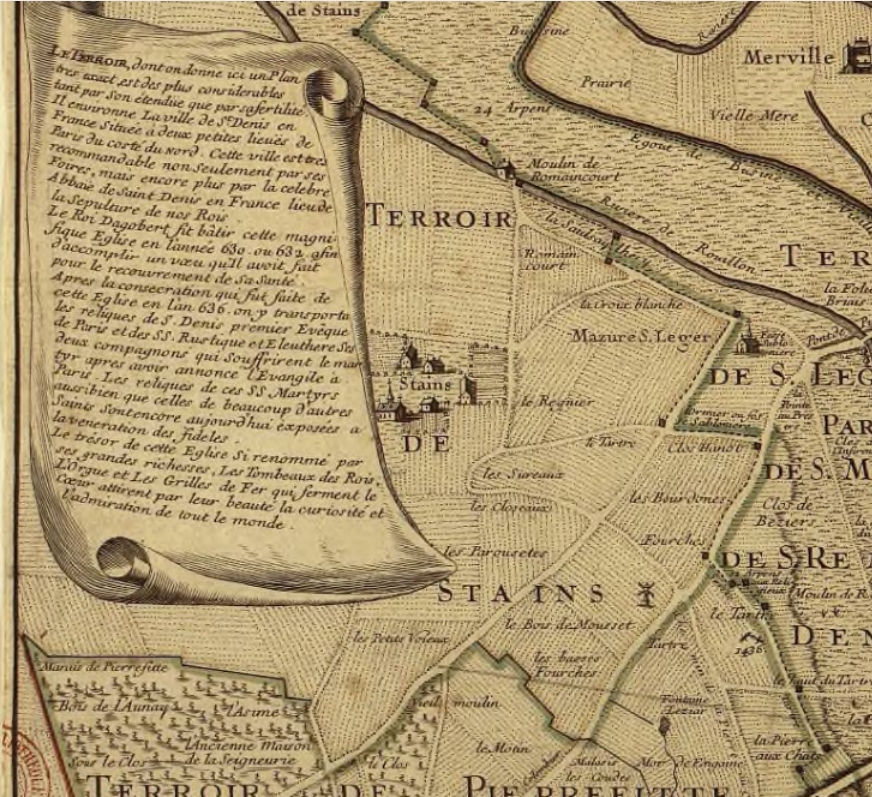 Plan partiel tiré du plan du terroir de St Denis en France et des paroisses alentours comprenant le terroir de Stains